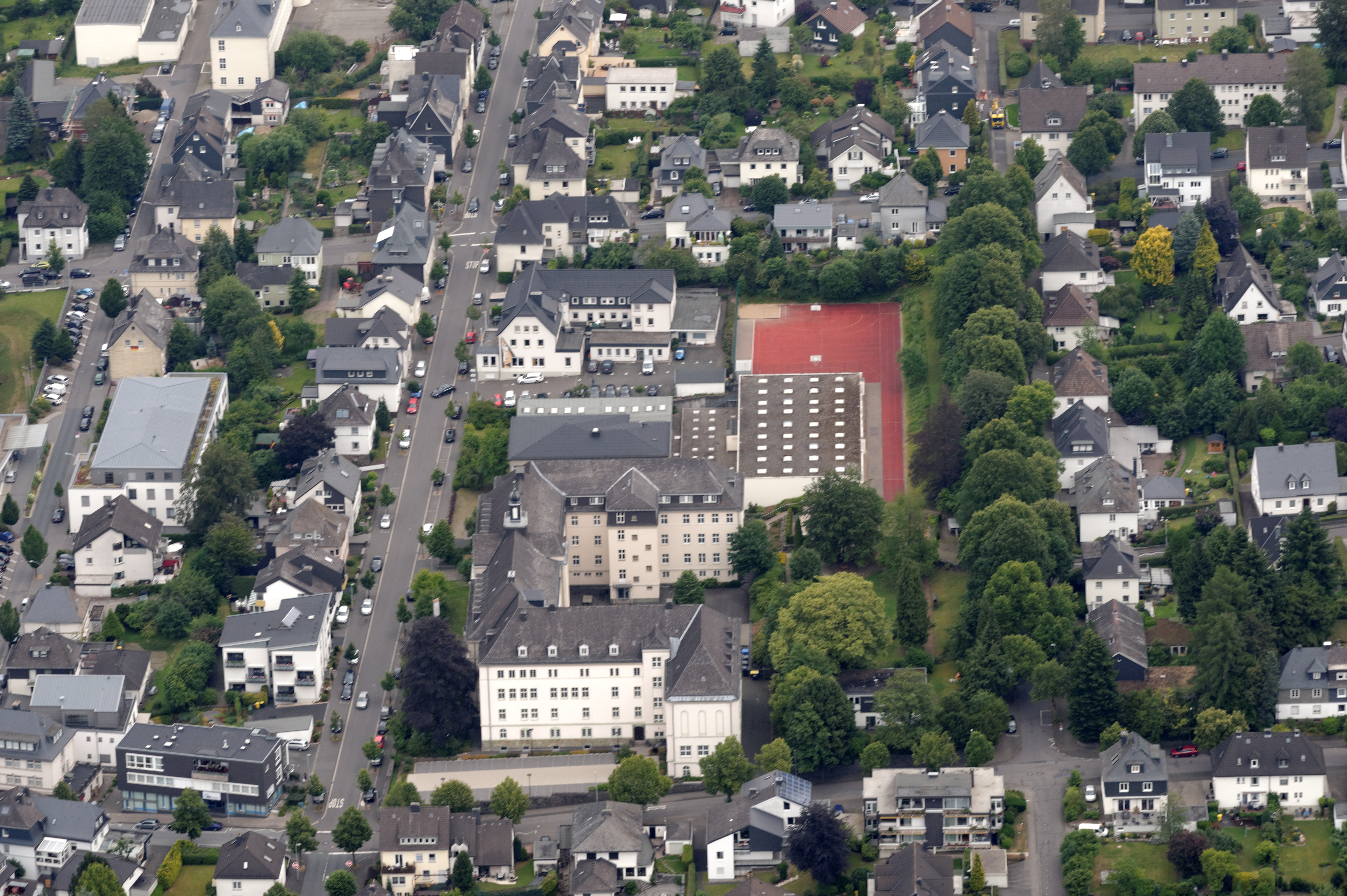 Fotoflug Sauerland Nord. Olpe, St.-Franziskus-Gymnasium, Blickrichtung Nordost The making of this document was supported by the Community-Budget of Wikimedia Germany.